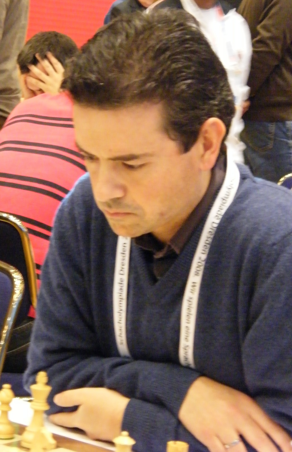 Camillo Pablo San Segundo bei der 38. Schacholympiade in Dresden 2008